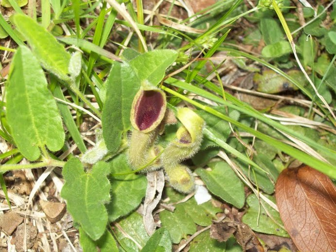 Aristolochia stuckertii. Aristolochiaceae. Fotos tomadas en suelos rocosos y arcillosos bajo bosque ribereño al margen del Río Negro y a la sombra en lugares húmedos en Palmar, departamento de Soriano, Uruguay.